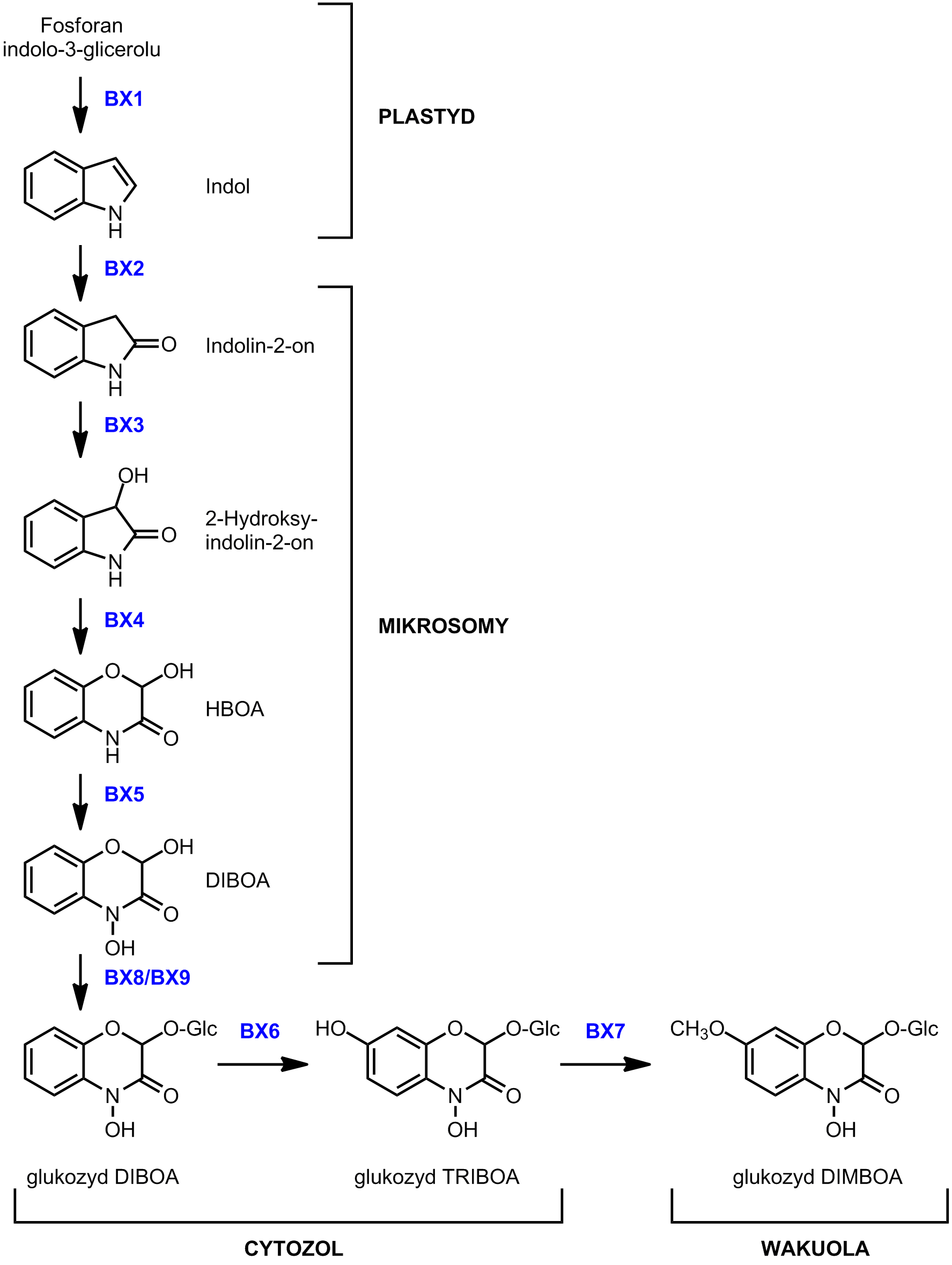 Biosynteza benzoksazynonu u kukurydzy. Pokazano enzymy (niebieski kolor), związki pośrednie i lokalizację wewnątrzkomórkową.